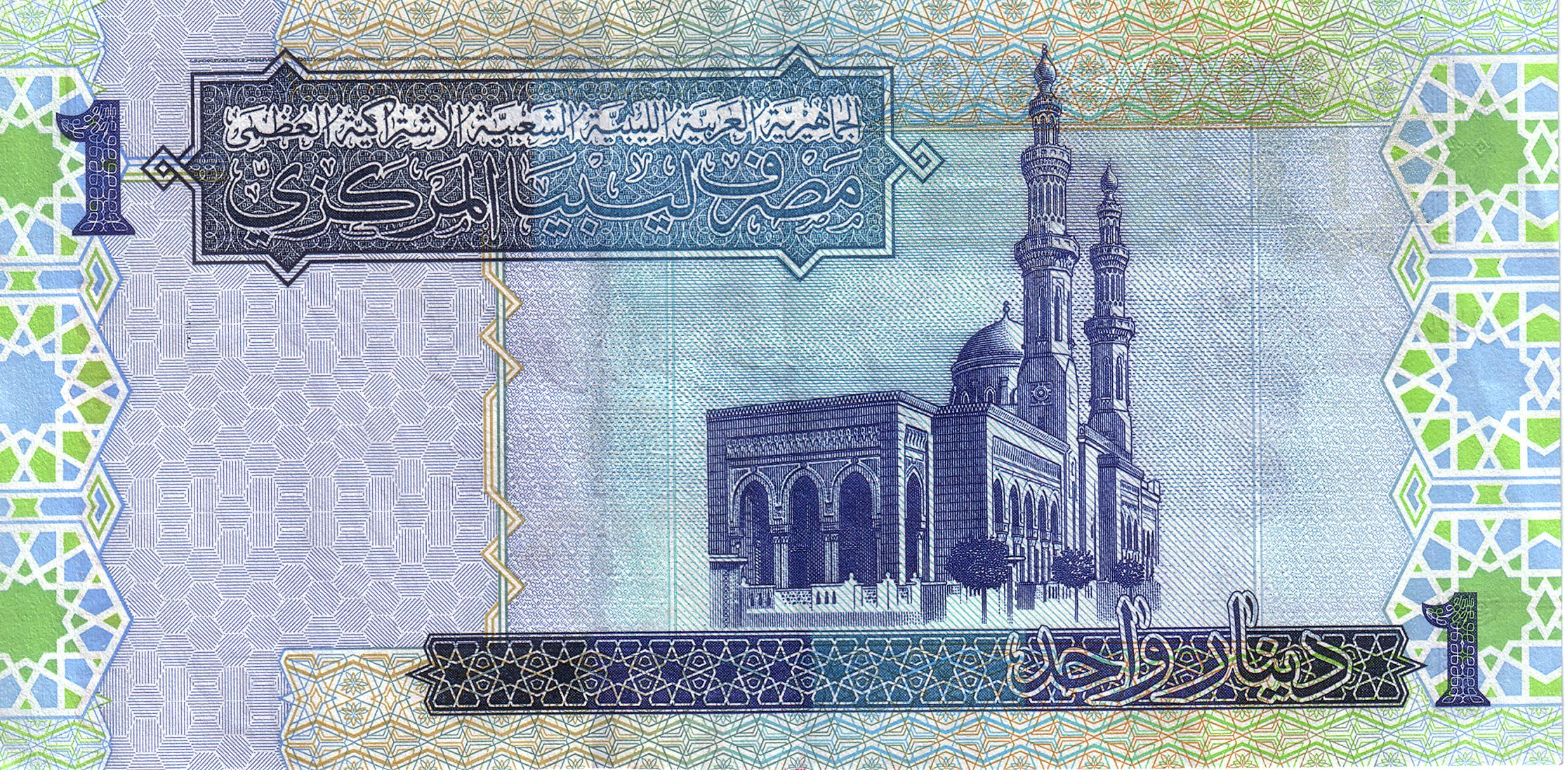 Банкнота номиналом один динар реверс.